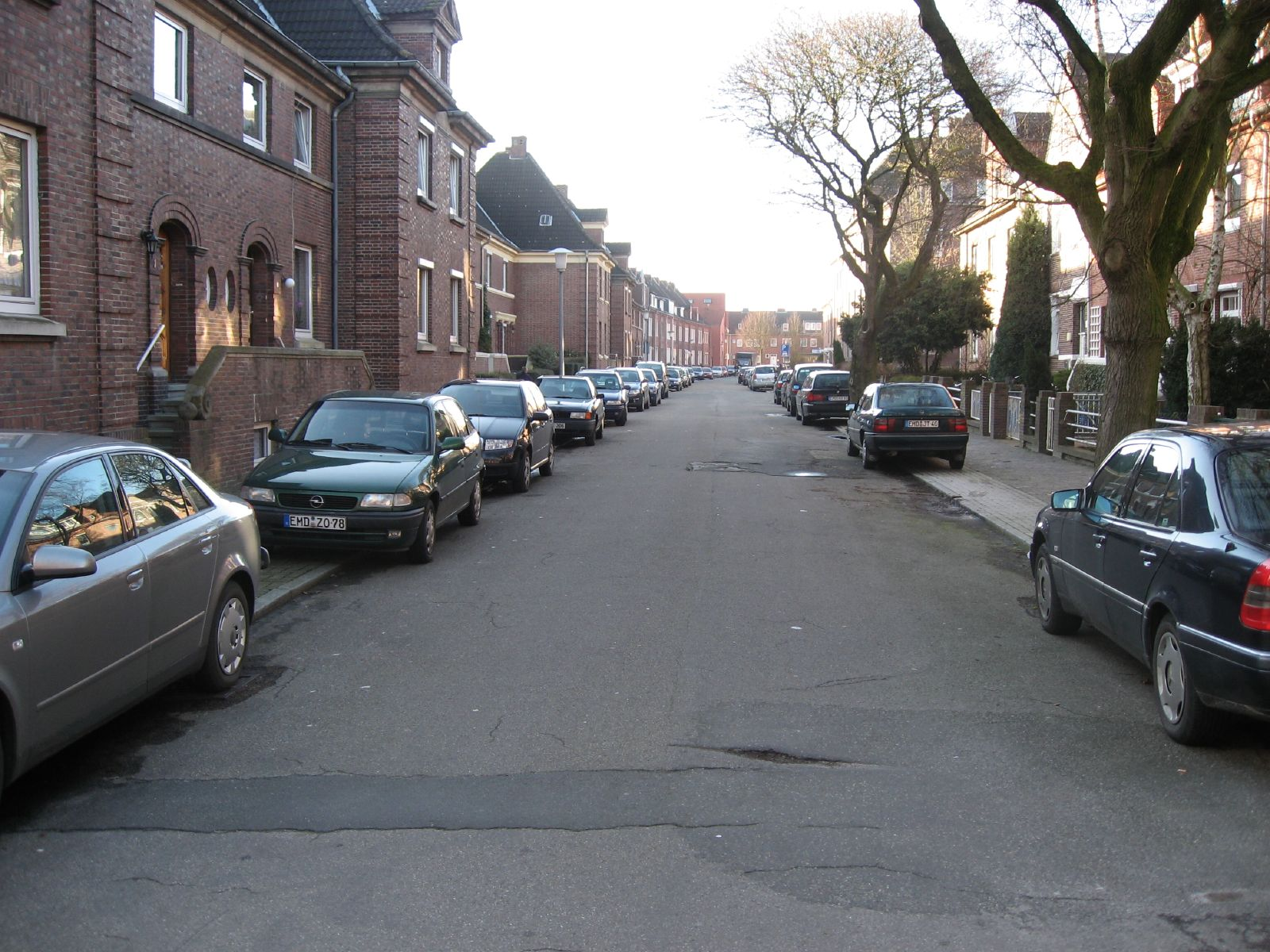 Straßenzug der Fokko-Ukena-Straße im Behördenviertel der Stadt Emden in Ostfriesland. Gut zu sehen sind die langen Klinkergebäude, die nach dem zweiten Weltkrieg in der zerbombten Stadt errichten wurden.